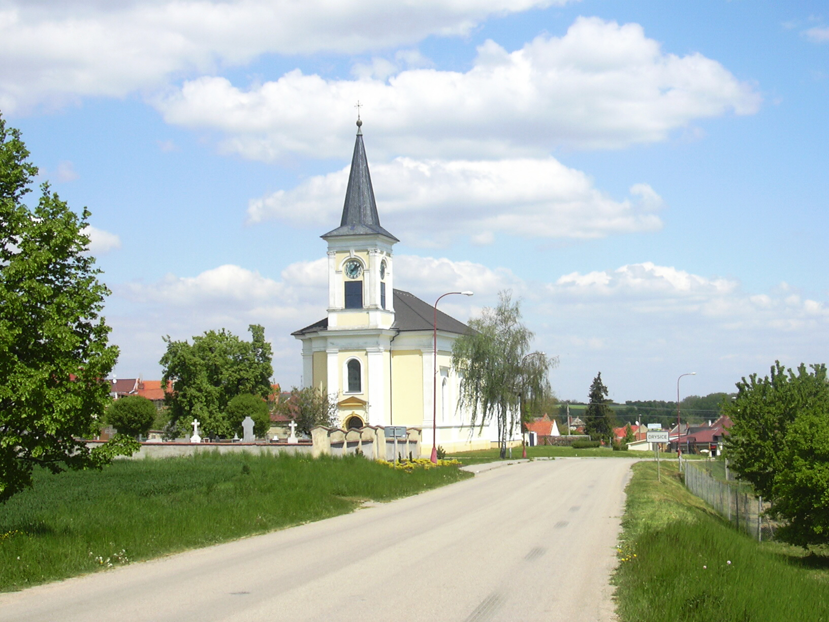 Farní kostel Narození Panny Marie, Drysice (Vyškov District - Czech republic)